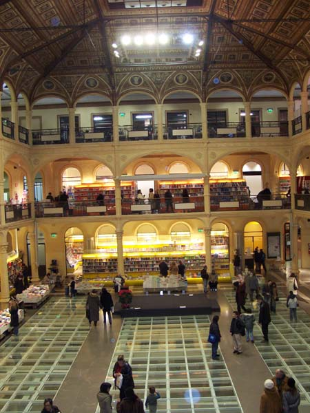 Biblioteca Sala Borsa is a library in Bologna